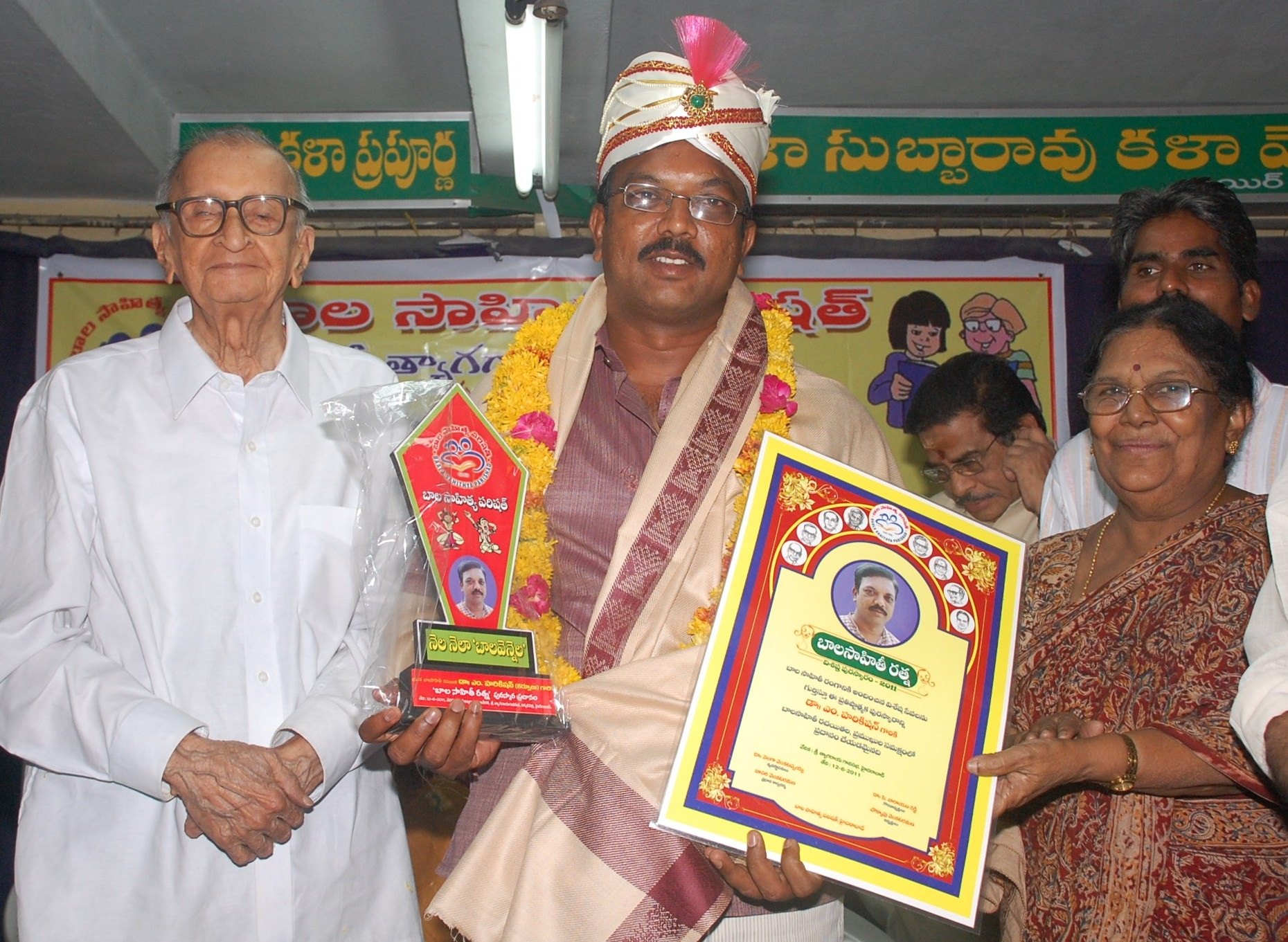 2011 లో బాలసాహితీ పురస్కార గ్రహీత - ఎం.హరికిషన్